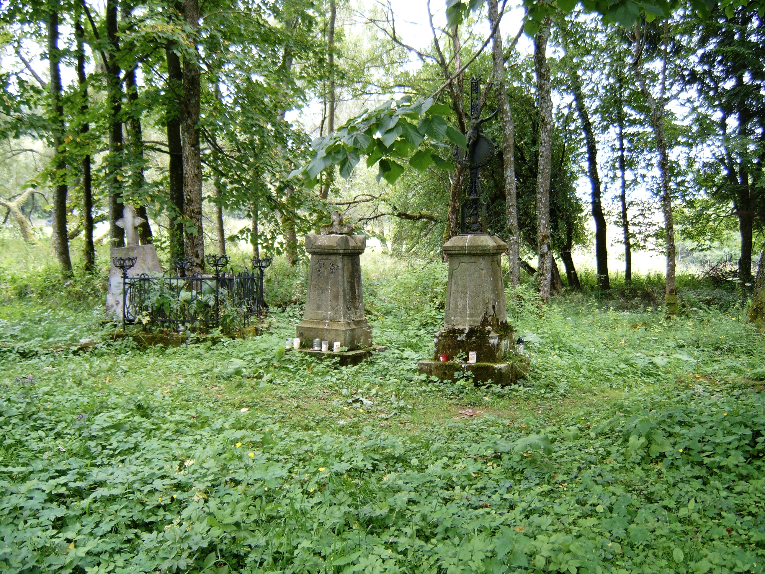 Miejsce po cerkwi w Łupkowie